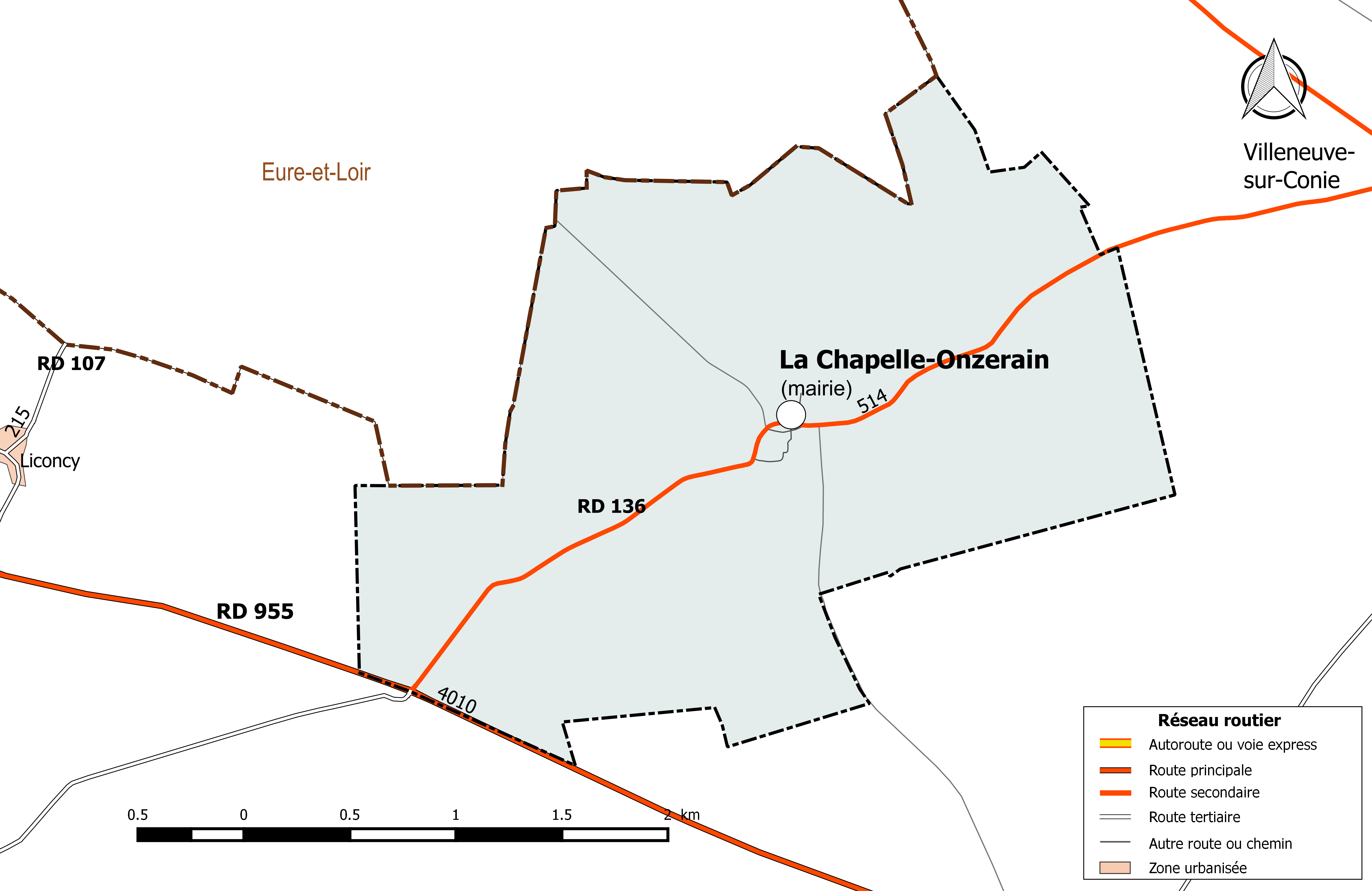 Carte du réseau routier de la commune de La Chapelle-Onzerain.